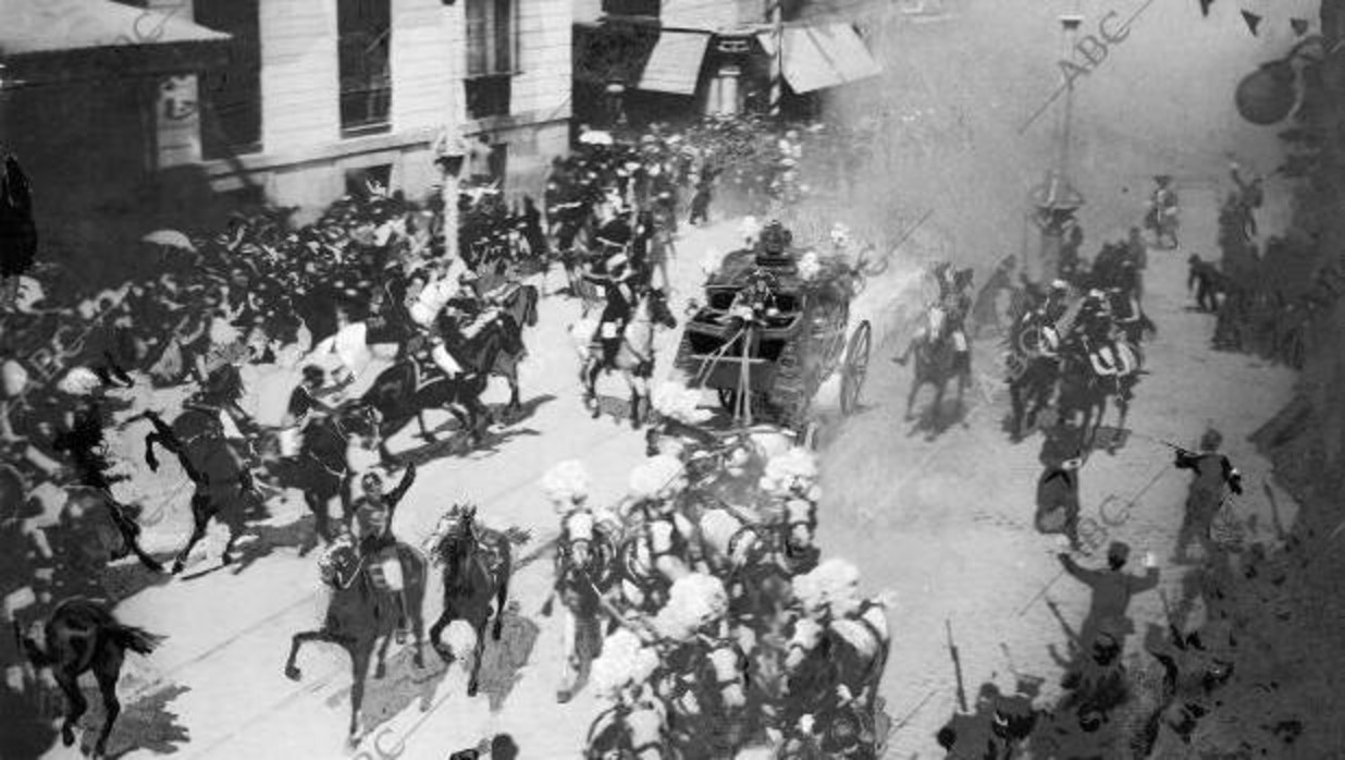 Momento en el que una bomba estalla en la calle Mayor de Madrid, mientras realiza el paso la comitiva nupcial de los reyes.